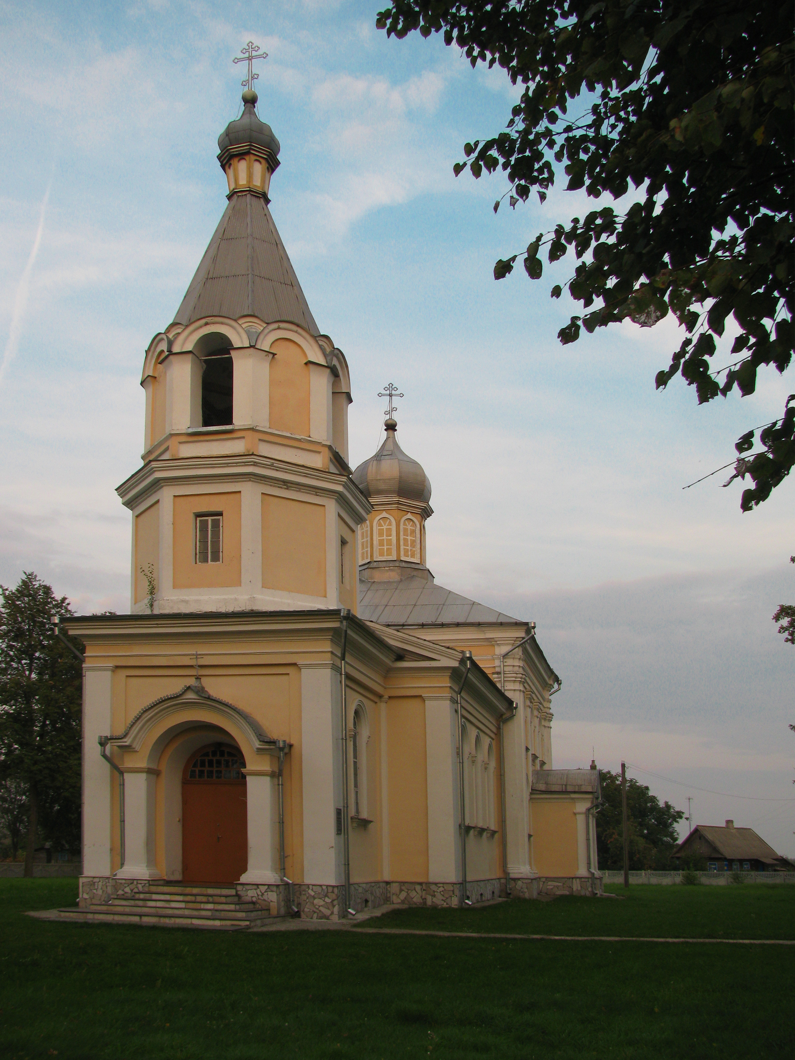 Беларуская (тарашкевіца): Усьпенская царква. в. Сялец This is a photo of Belarusian heritage monument. Reference number: 113Г000156 ( WLM)